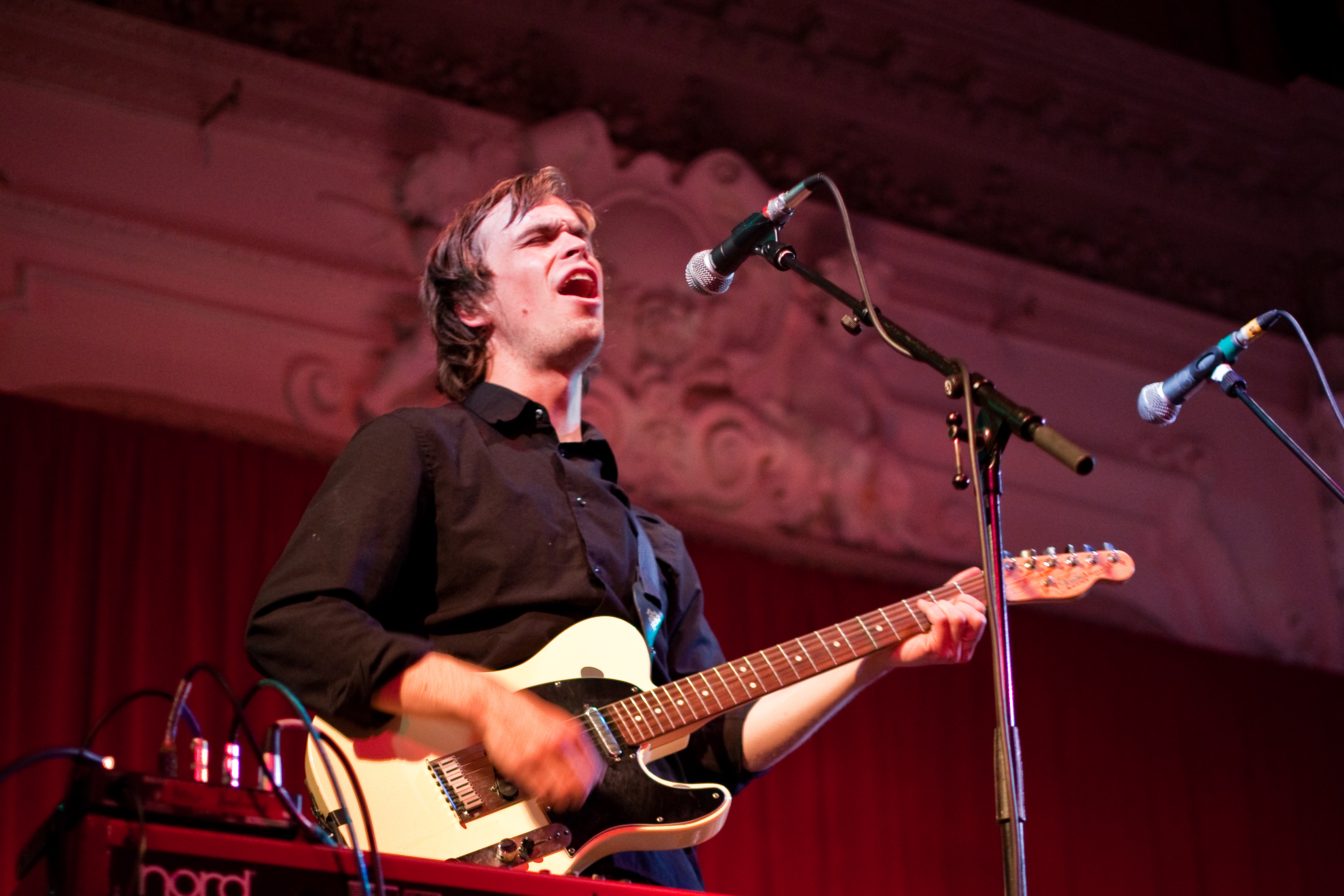 Peter Broderick